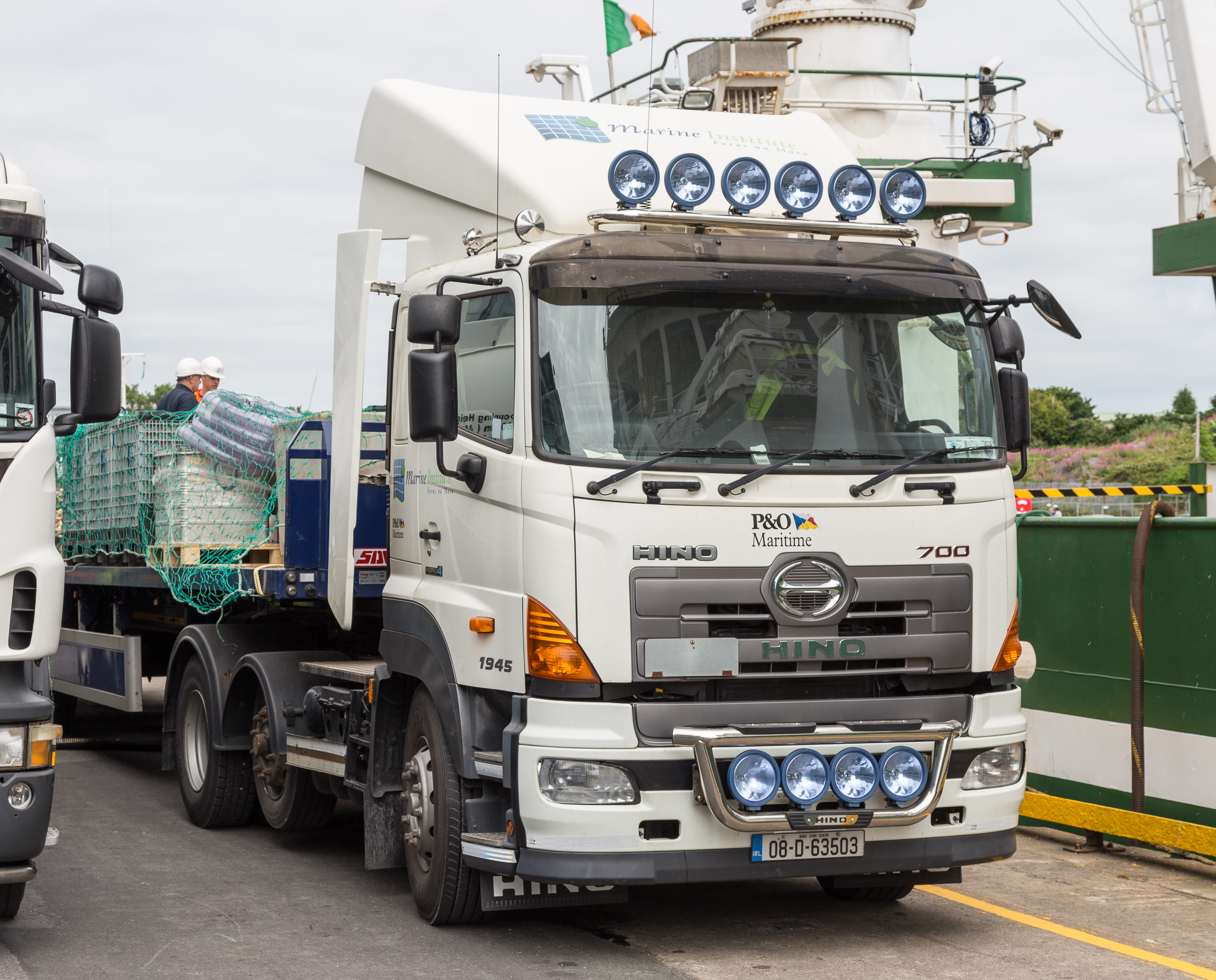 Hino 700 Serie 1945 im Hafen von Galway (IRL)